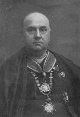 Eduard Dominik (1854 - 1919), Český kněz, biblista a pedagog.